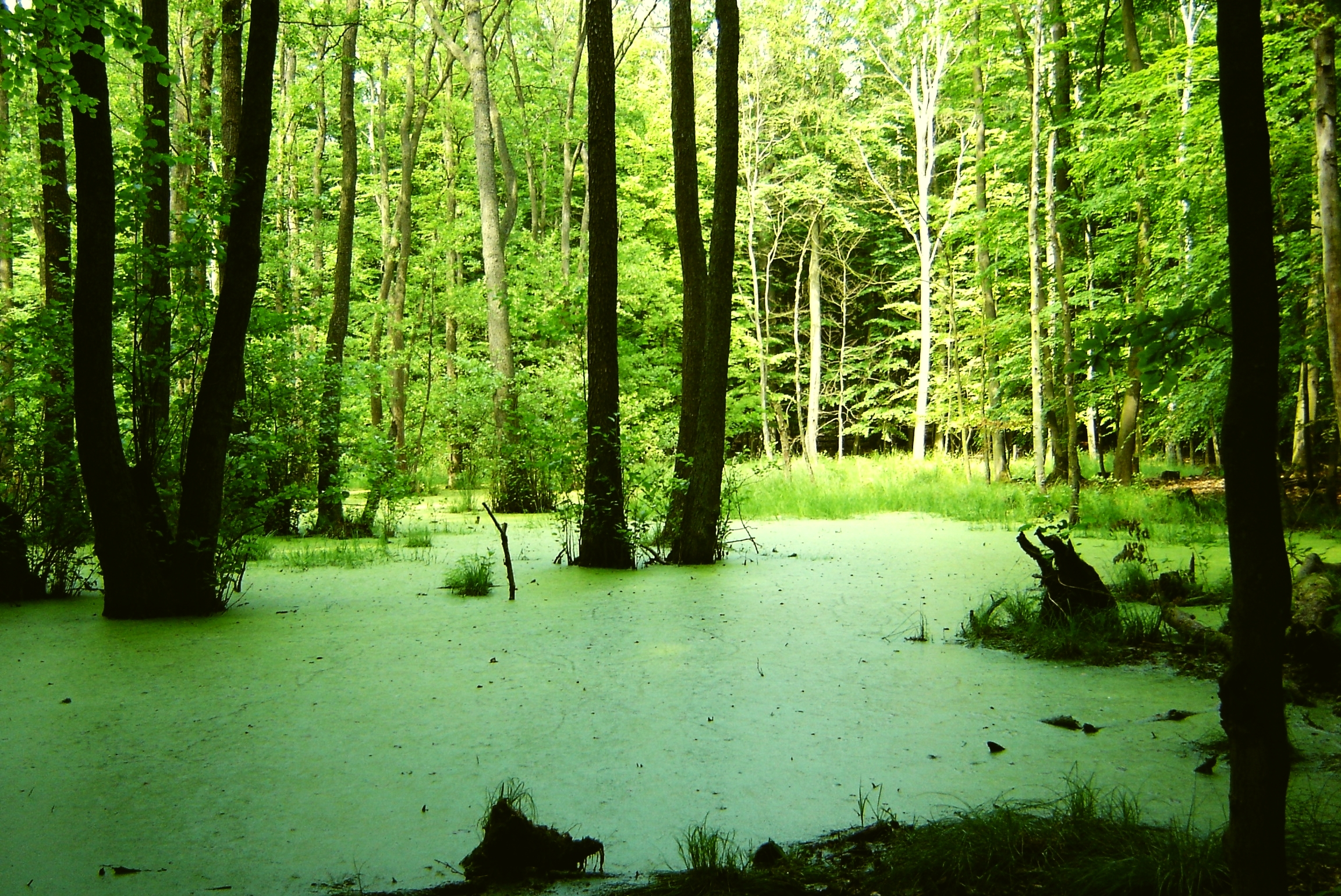 Schwarzerlenwald im Hinrichshagener Forst. Die ehemaligen Bruchflächen sind durch höhere Anstauung des Wasserspiegels zu Offensümpfen mit ständiger Wasserbedeckung geworden, was das Absterben der Schwarzerlen zur Folge haben wird. (Stadt Woldegk, Mecklenburg).